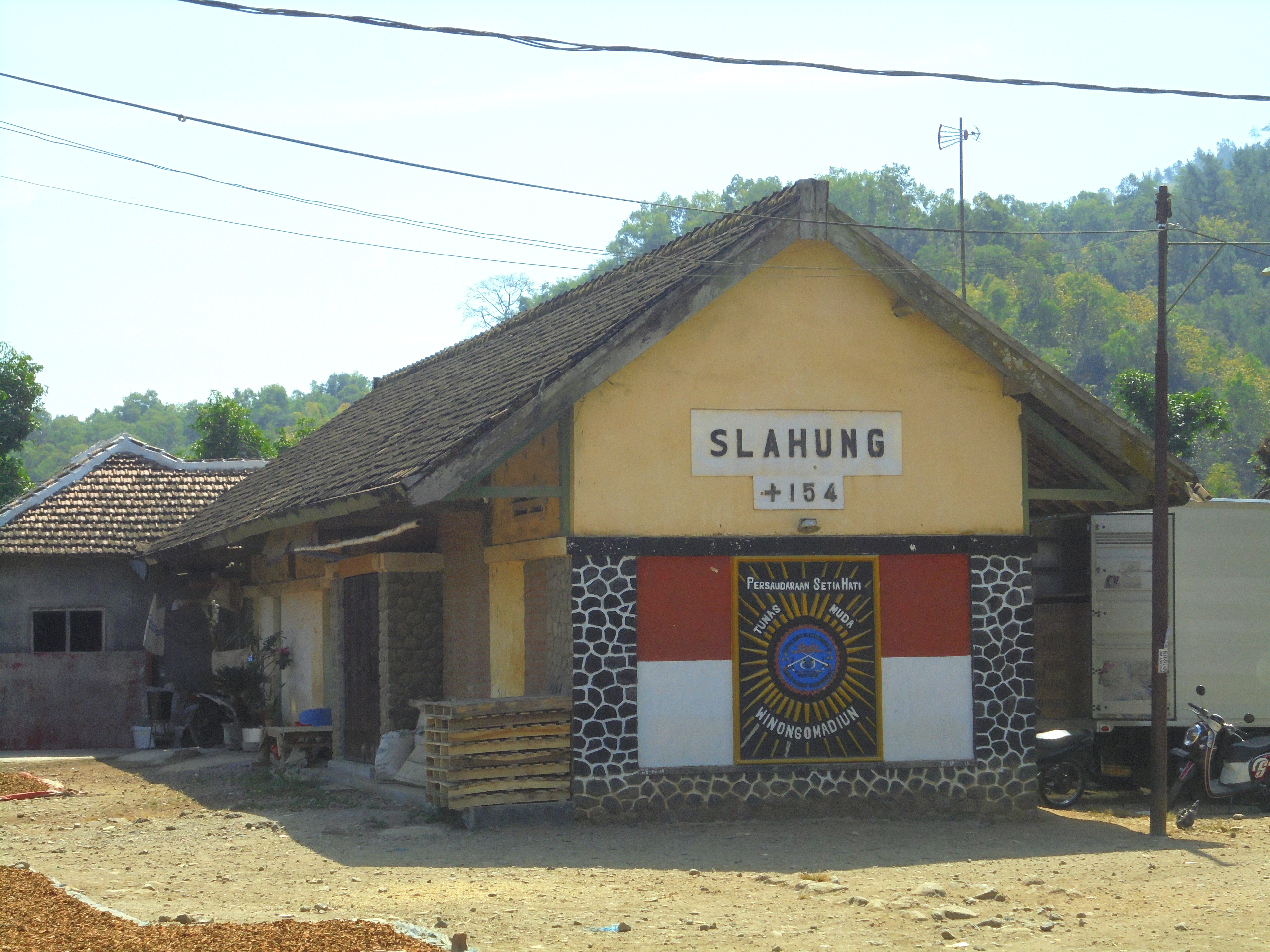 Tampak luar bangunan Stasiun Slahung, stasiun nonaktif yang terletak paling selatan di Kabupaten Ponorogo